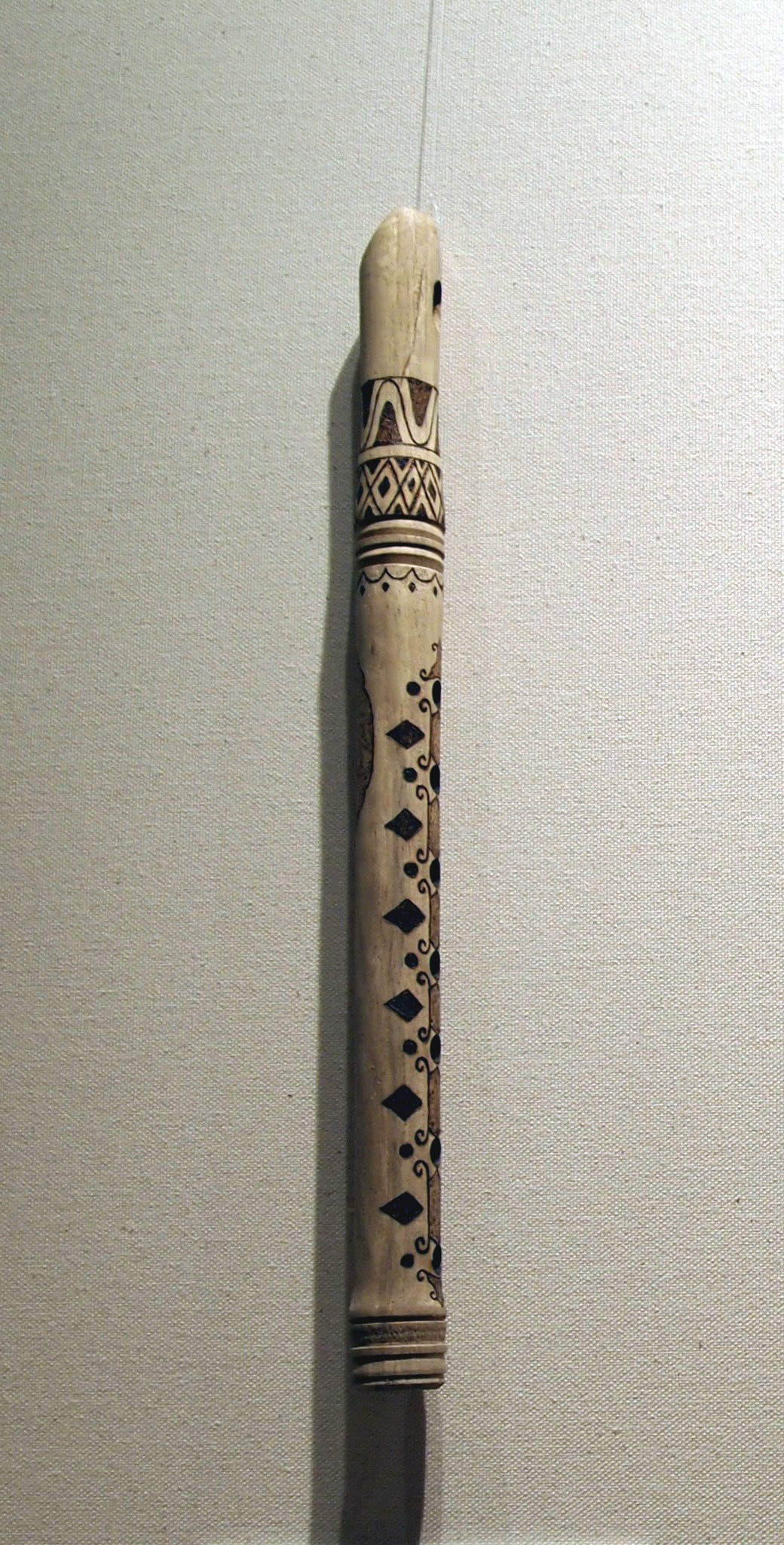 Tutek, instrument de musique à vent d'Azerbaïdjan. Exposition Azerbaïdjan musée de Cognac novembre 2012